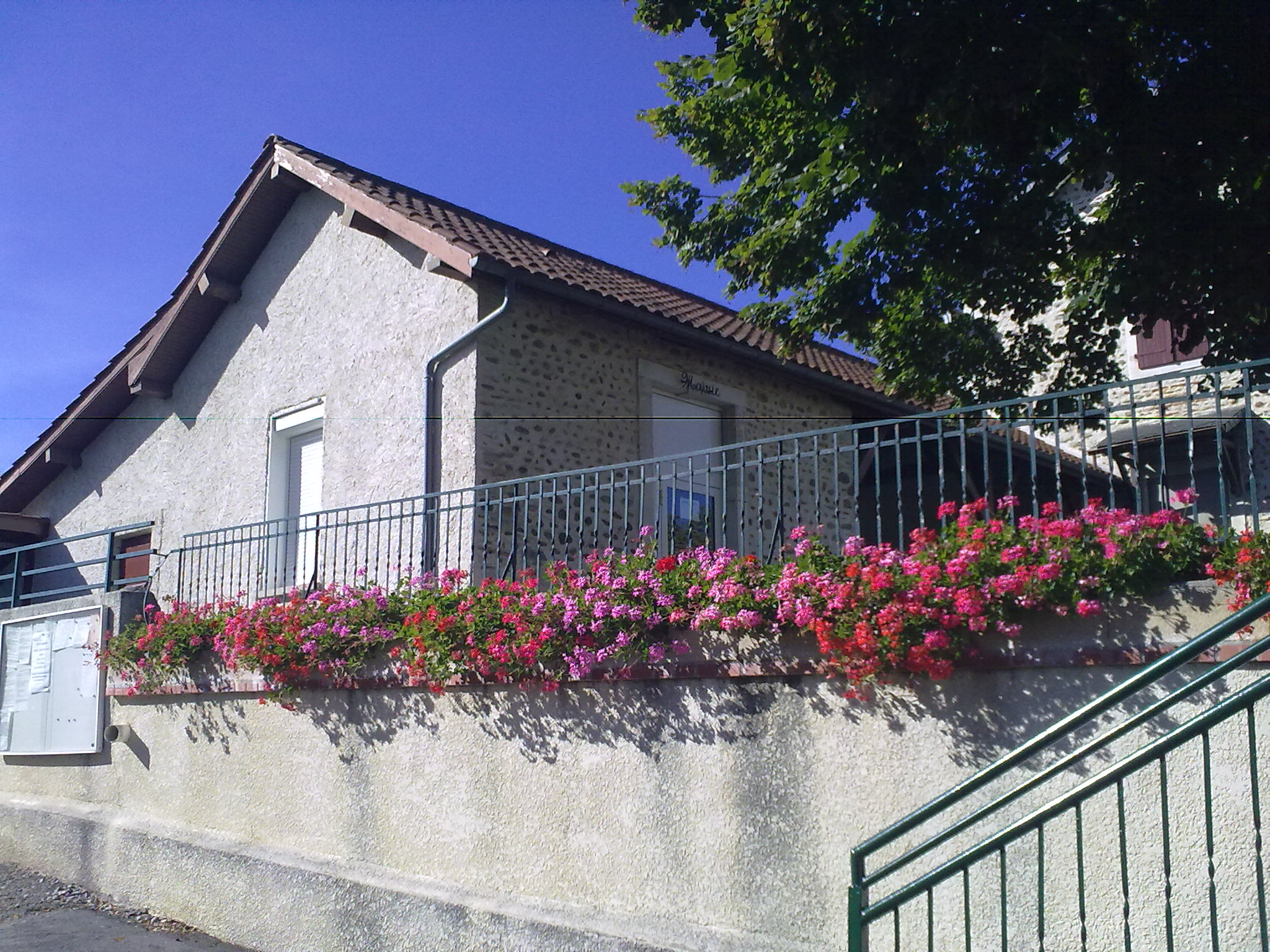 Saint-Armou le 30 août 2010, France.